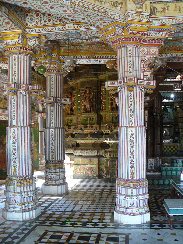 Bhandasar Jain Temple in Bikaner, Rajasthan, India